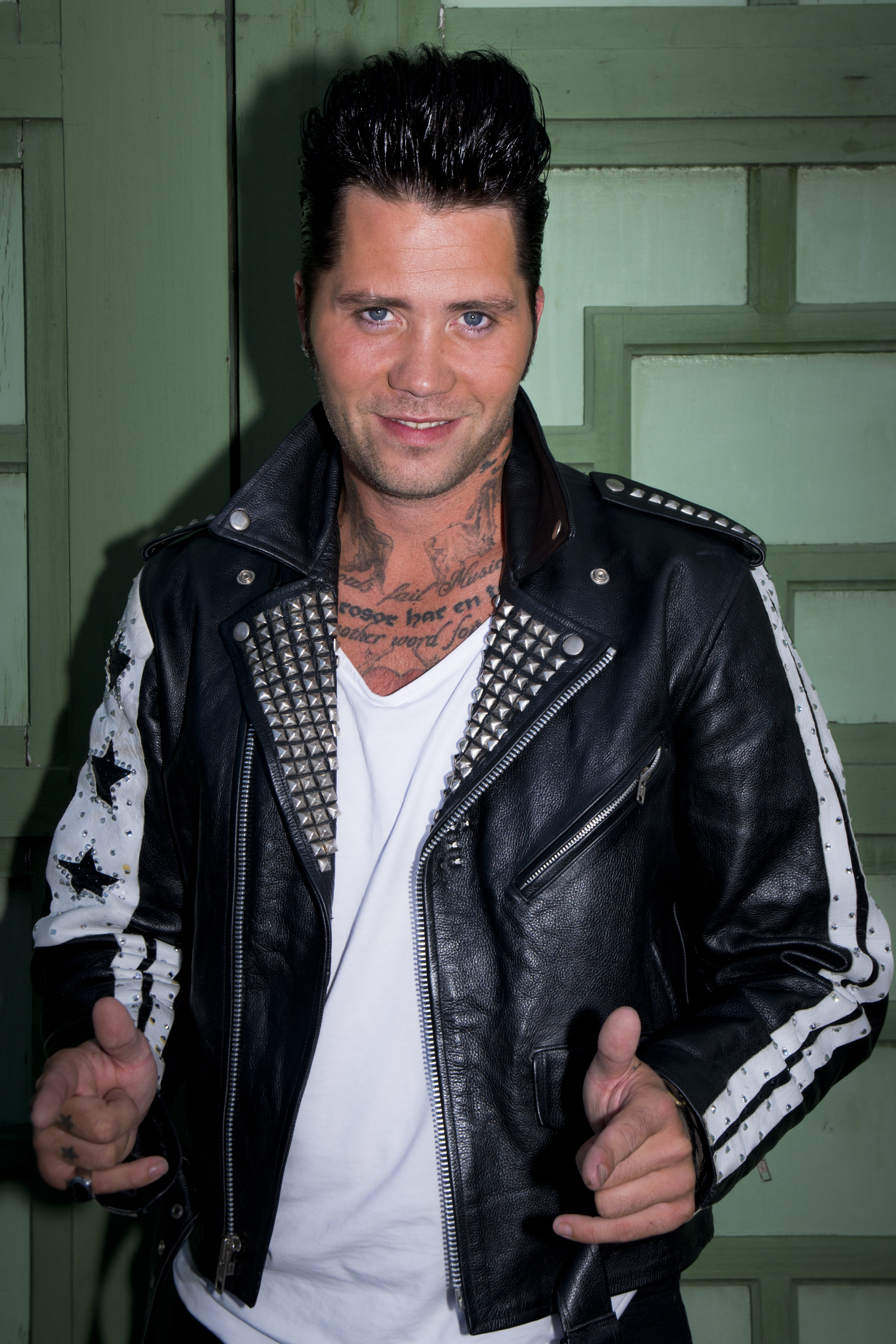 Brolle på Sommarkrysset, Gröna Lund i Stockholm